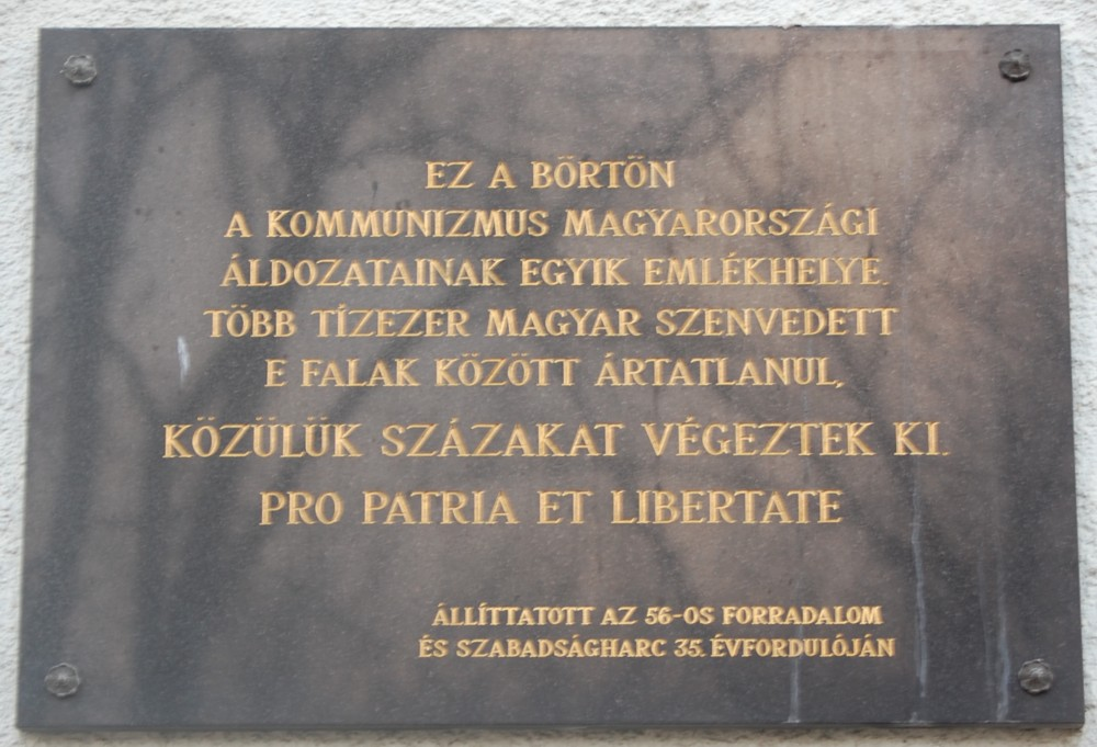 Emléktábla a Budapesti Fegyház és Börtön (Kozma u. 13.) falán. Az Újhegyi úti oldalon. Újhegyi út, Budapest, X. kerület, Magyarország.